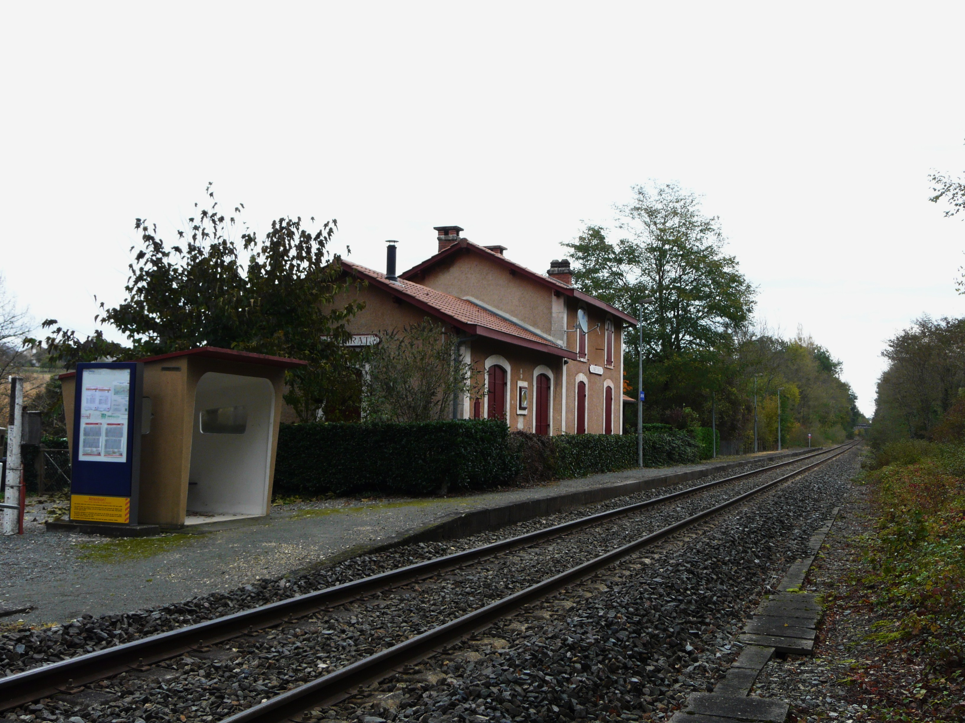 La voie en direction de Brive-la-Gaillarde en gare de Limeyrat, Dordogne, France.